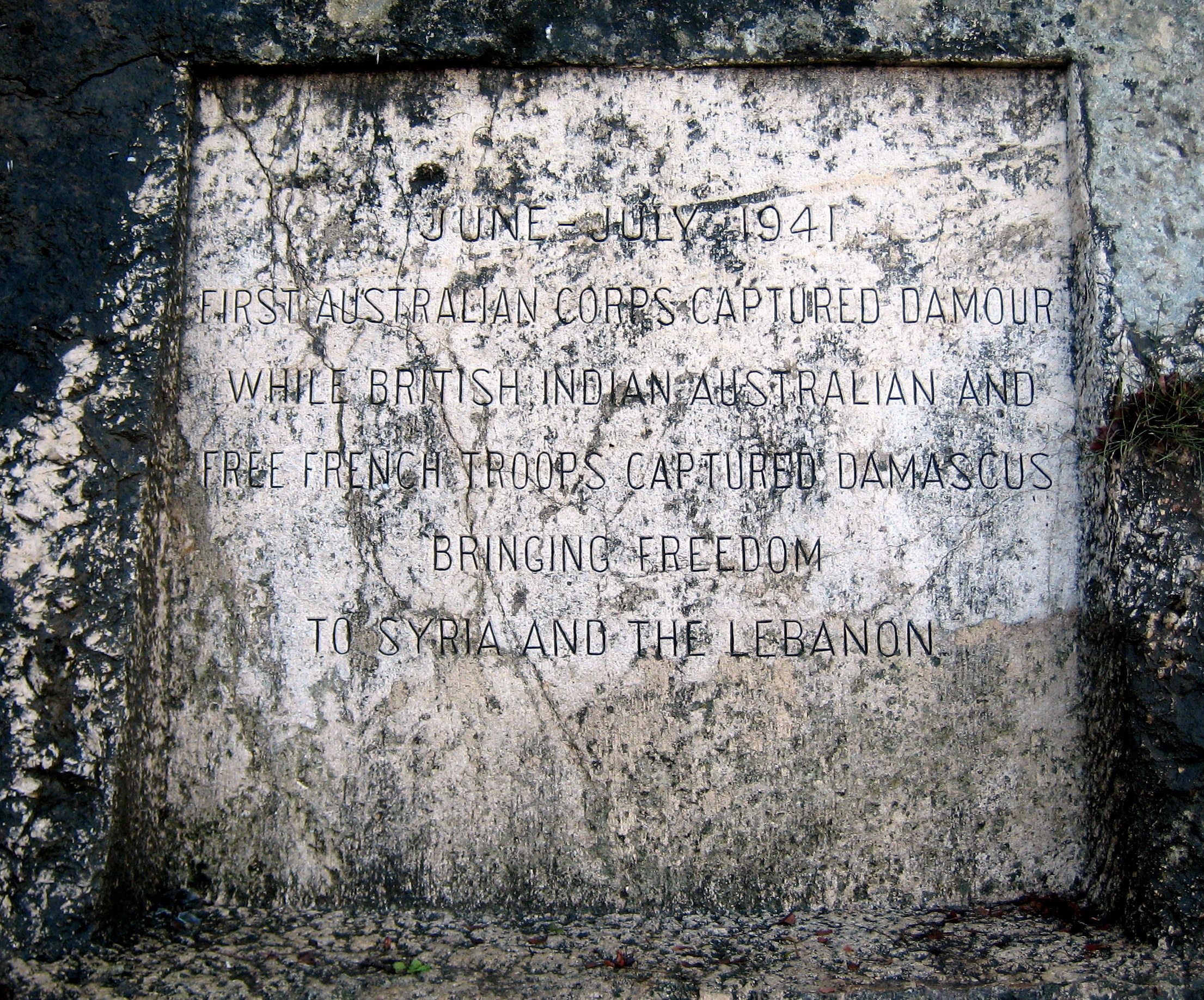 Plaque commémorative de la prise de Damour en 1941 par les troupes australiennes